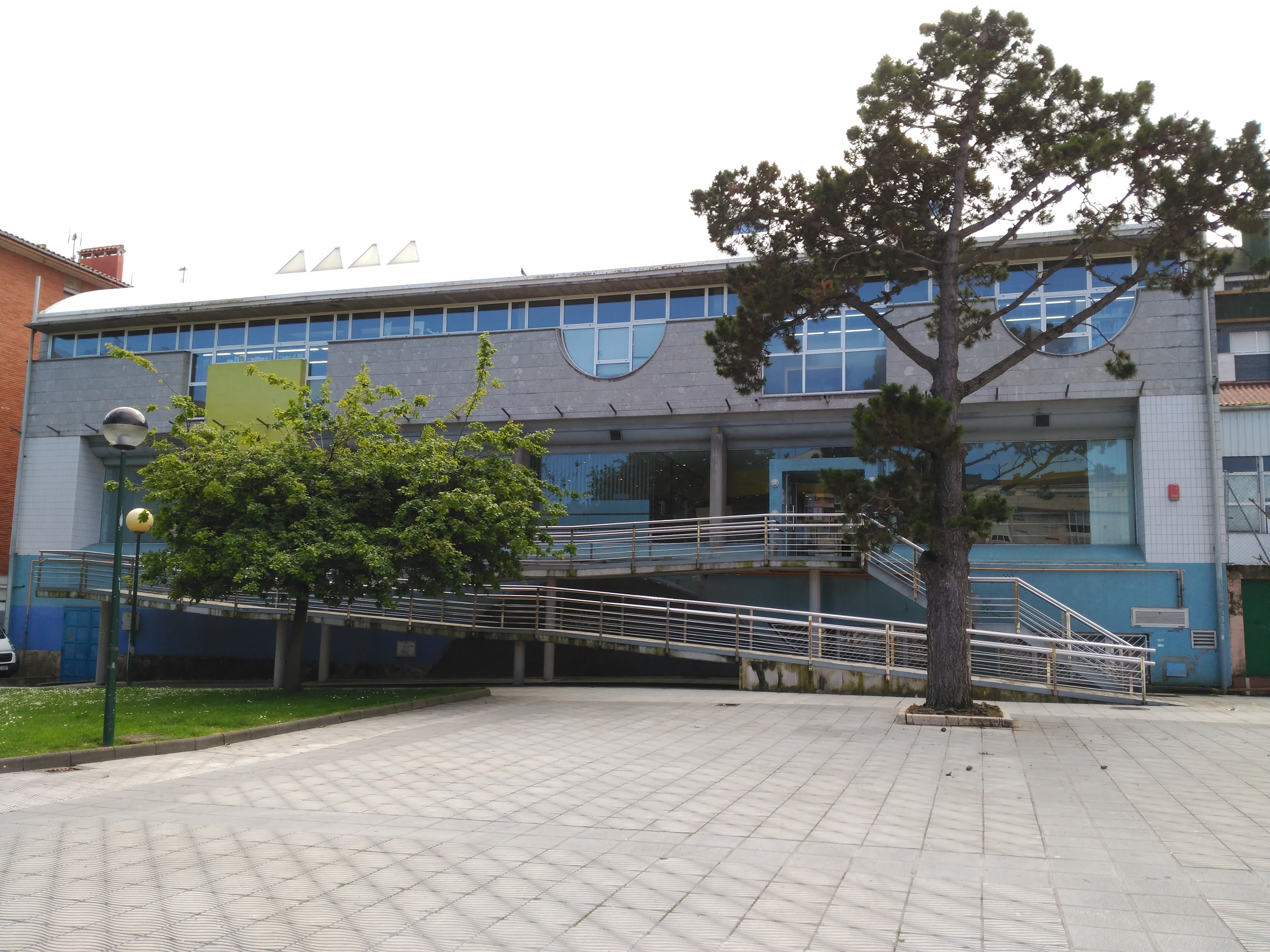 Edificio de la Biblioteca Pública Municipal Mariano Suárez-Pola, Luanco (Gozón), Asturias, España